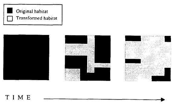 (Collinge 1996).